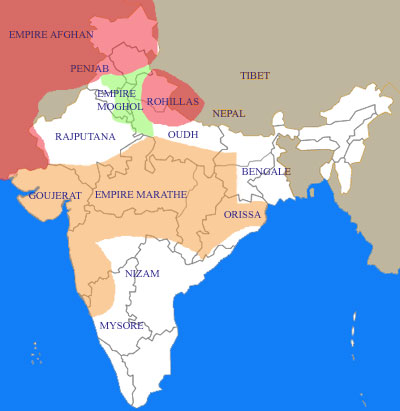 Carte de l'Empire marathe à son apogée